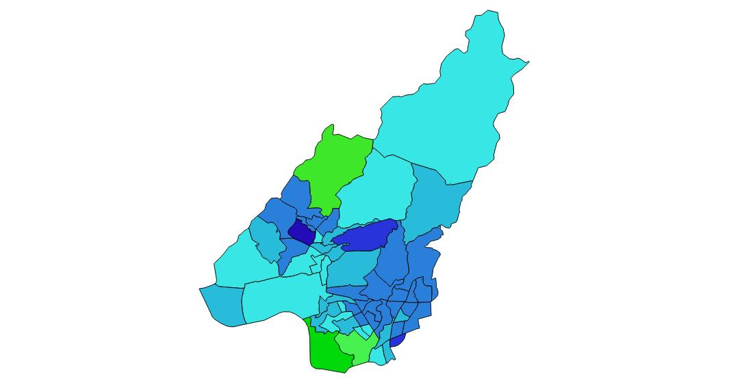 中文（中国大陆）: 蓝色为中国国民党候选人领先，绿色为民主进步党高建智领先。